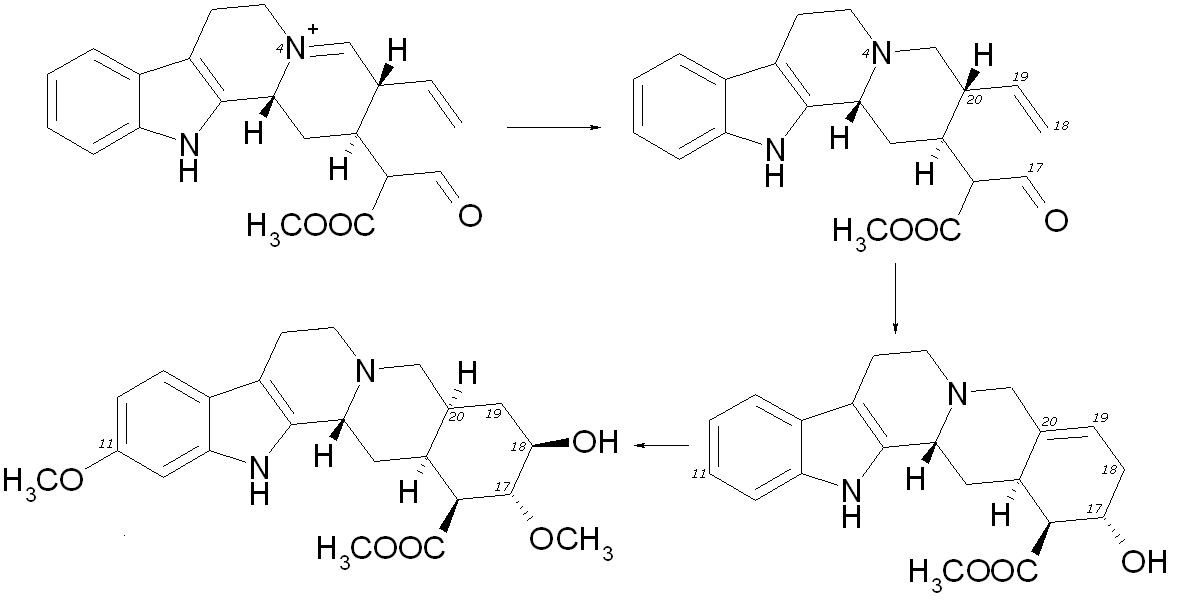 Reserpin-Biosynthese Teil 3: Der Weg zum Reserpinsäuremethylester.